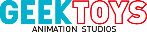 Logo del estudio de animación Geek Toys Inc.